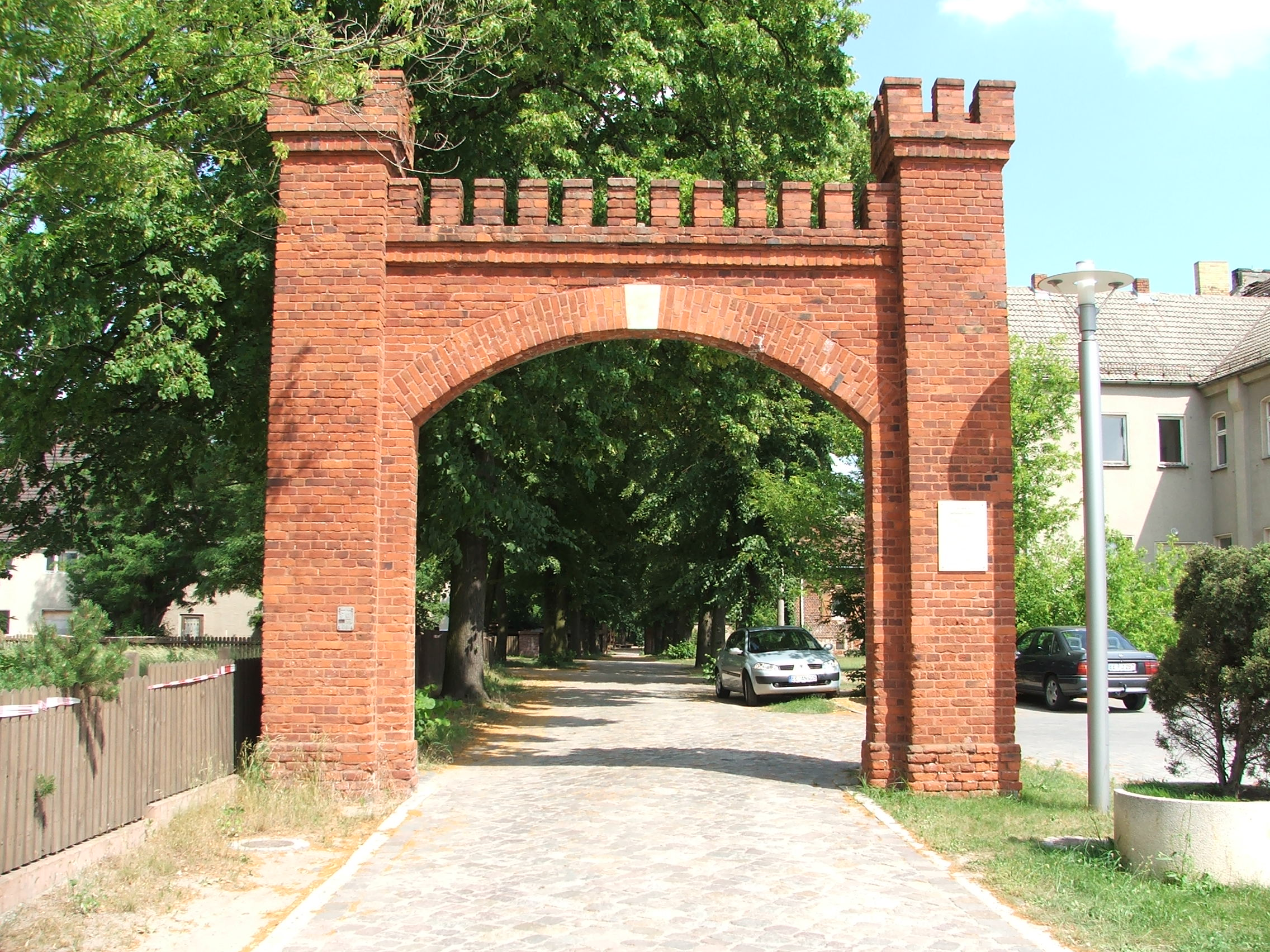 Eingang zum Rittergut, heute Stadtpark